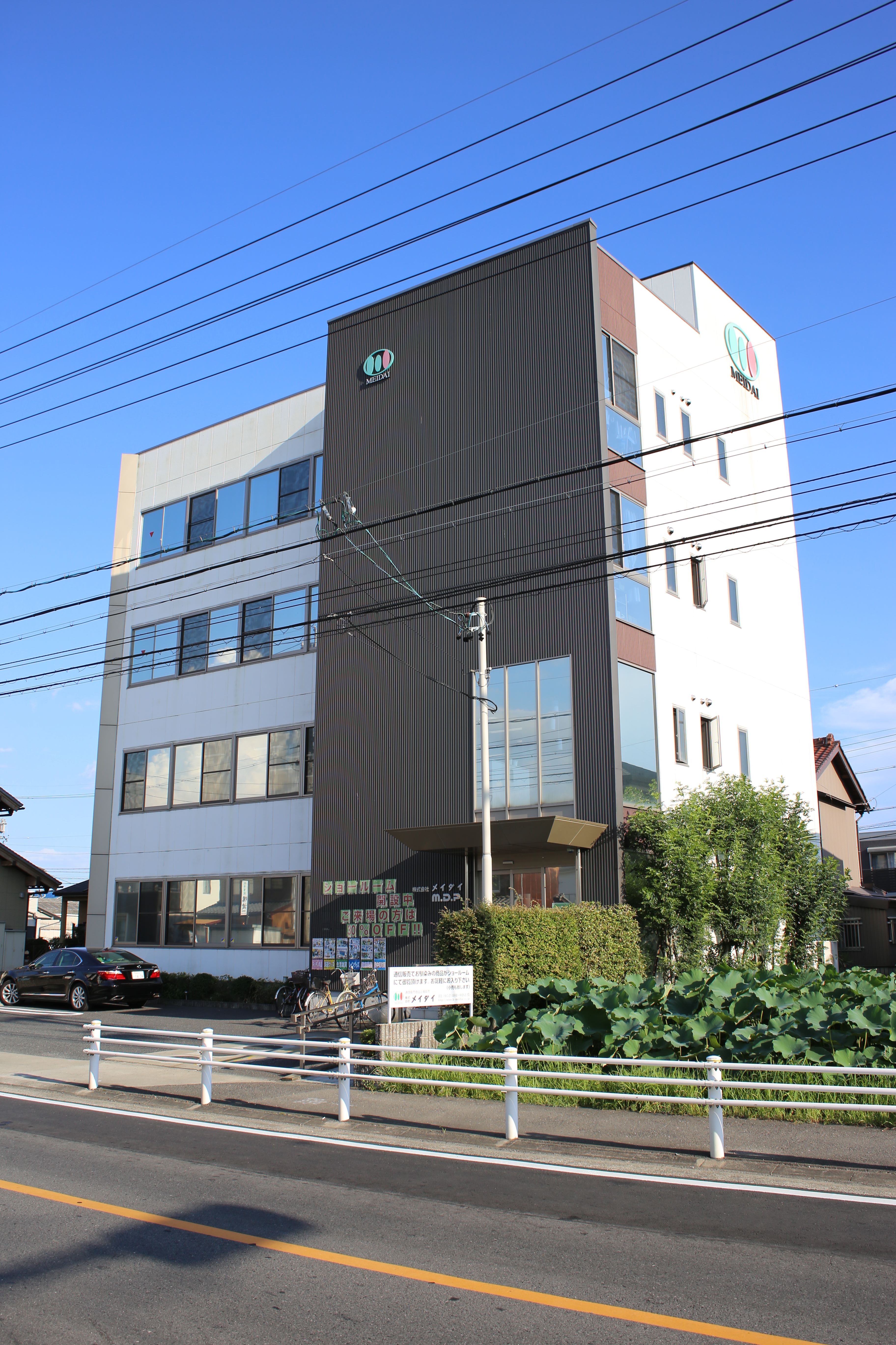 愛知県清須市新清洲のメイダイ本社を北側公道西側より撮影